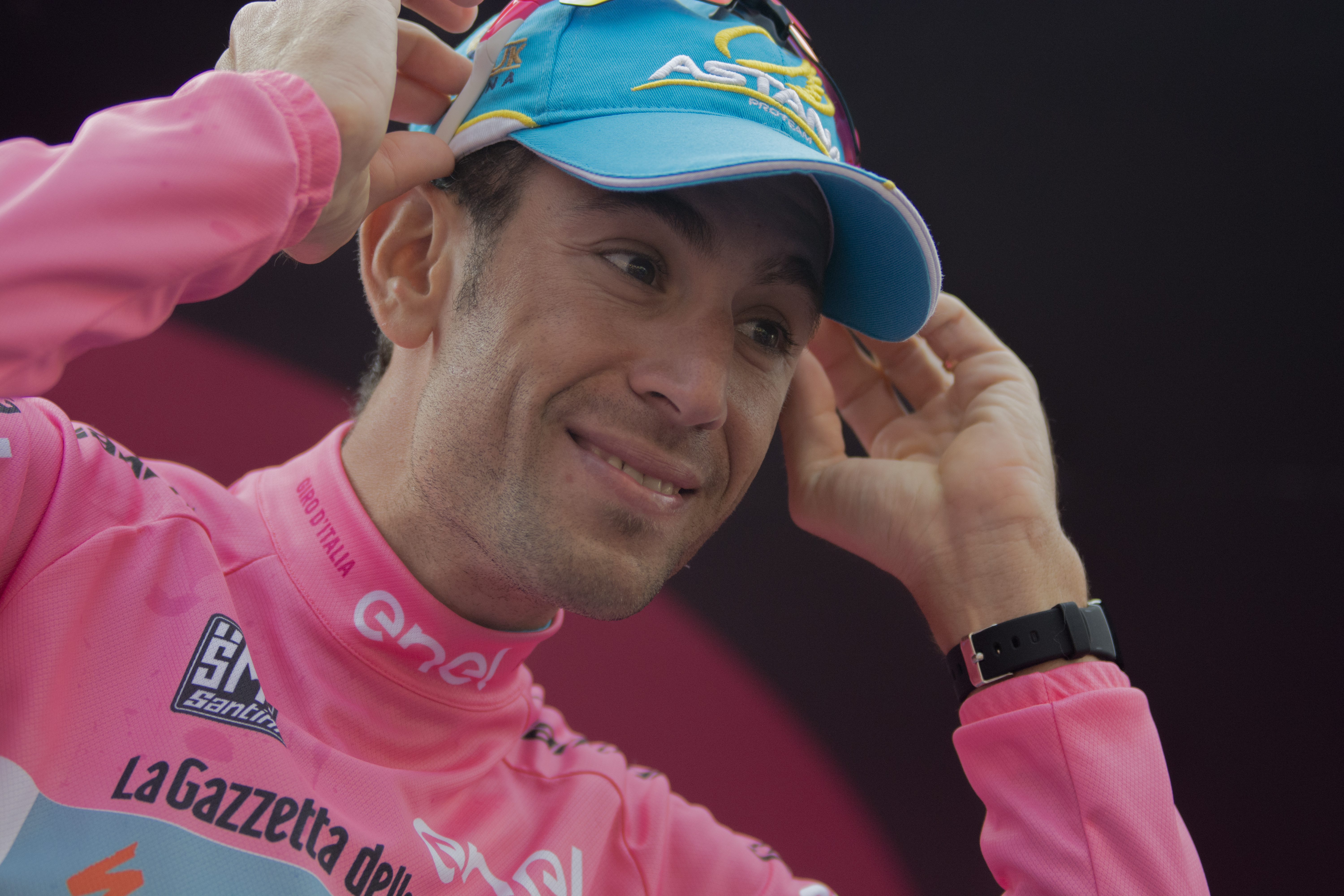 Vincenzo Nibali on the 99th Giro d'Italia podium.